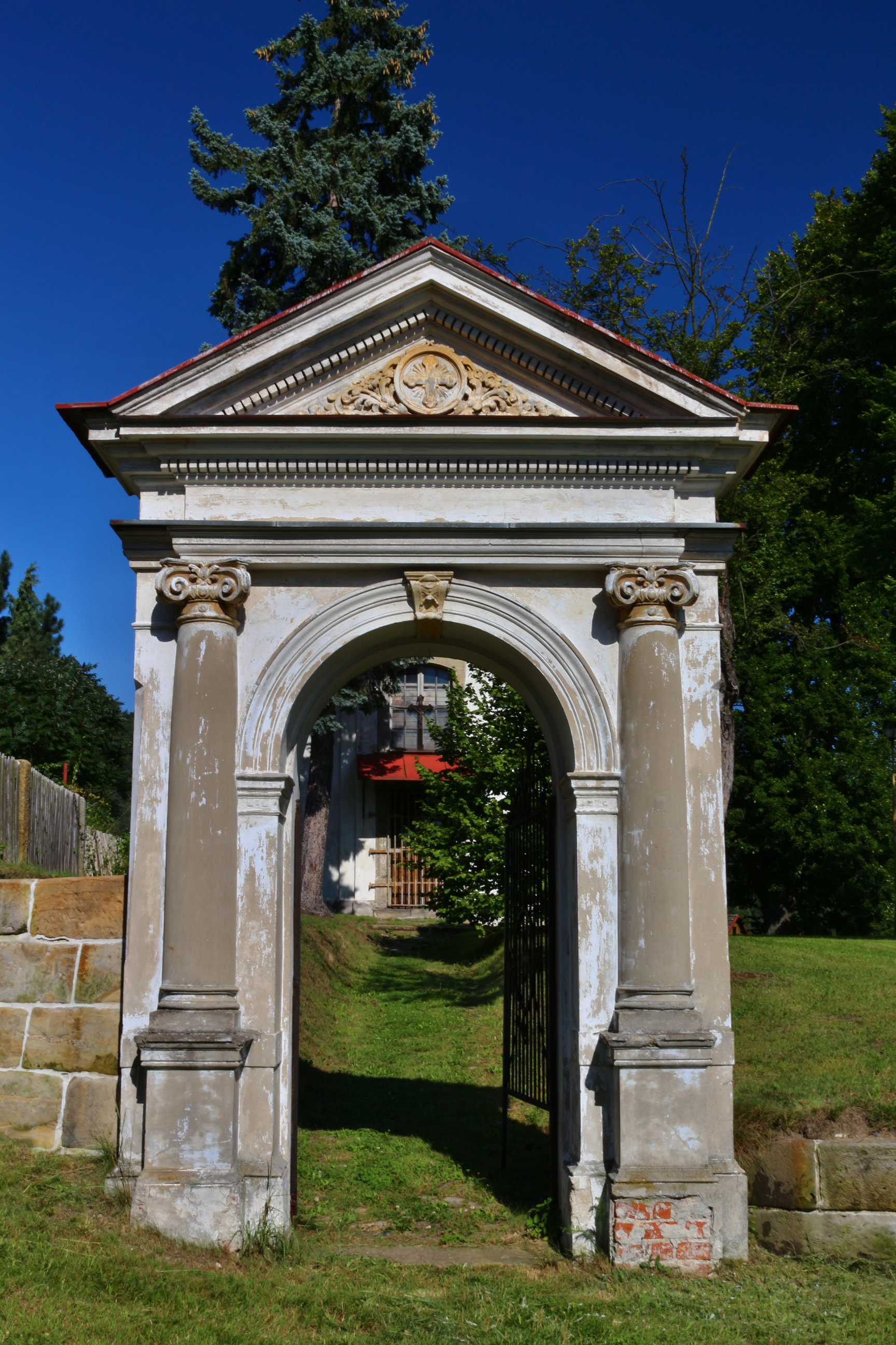 Kostel Nejsvětější Trojice v Novinách pod Ralskem